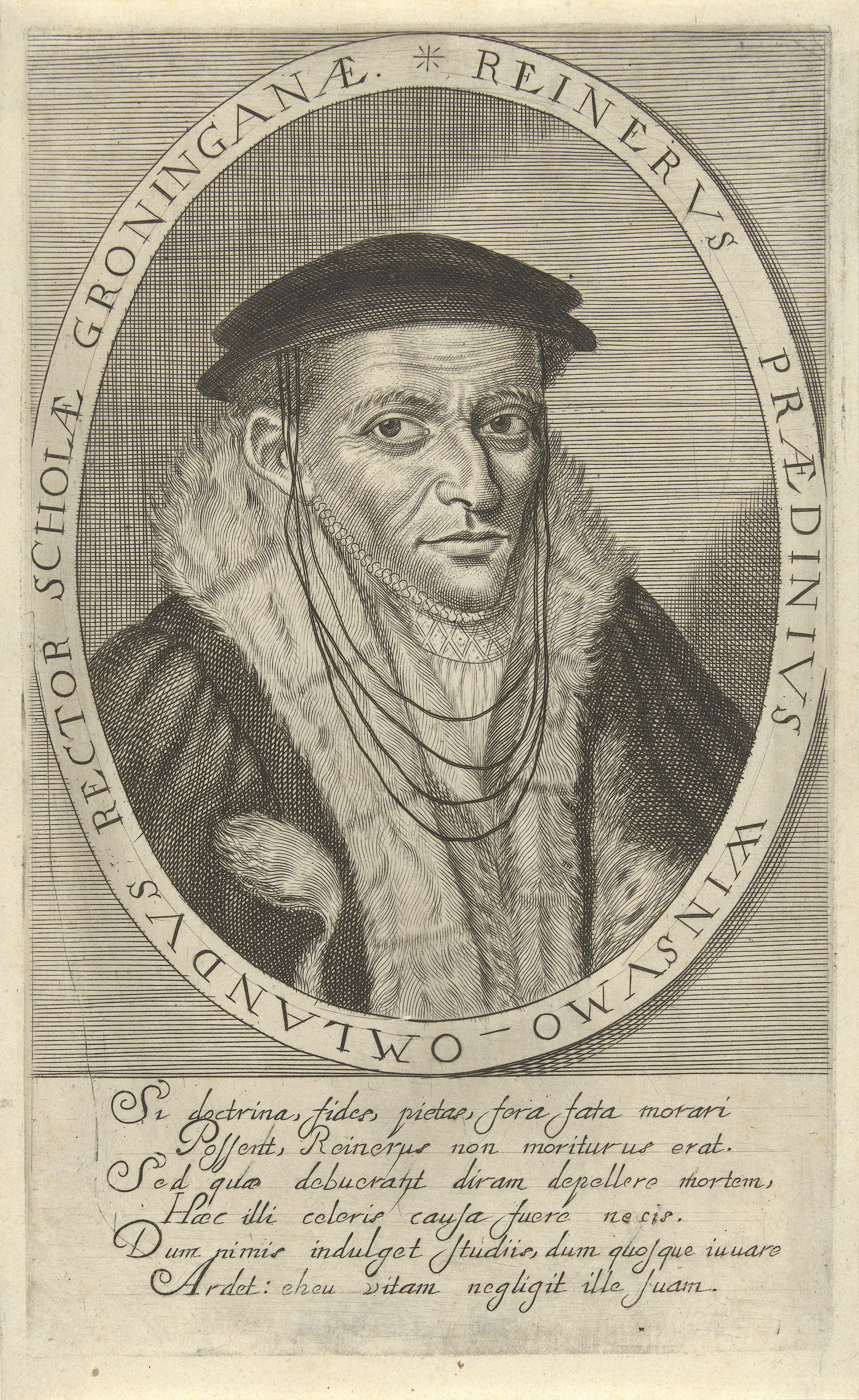 Portretbuste in ovaal naar rechts van Regnerus Praedinius, rector der Latijnse scholen te Groningen, met hoofddeksel. Op de ovale omlijsting staat een randschrift in Latijn, in de marge een zesregelig Latijns vers.